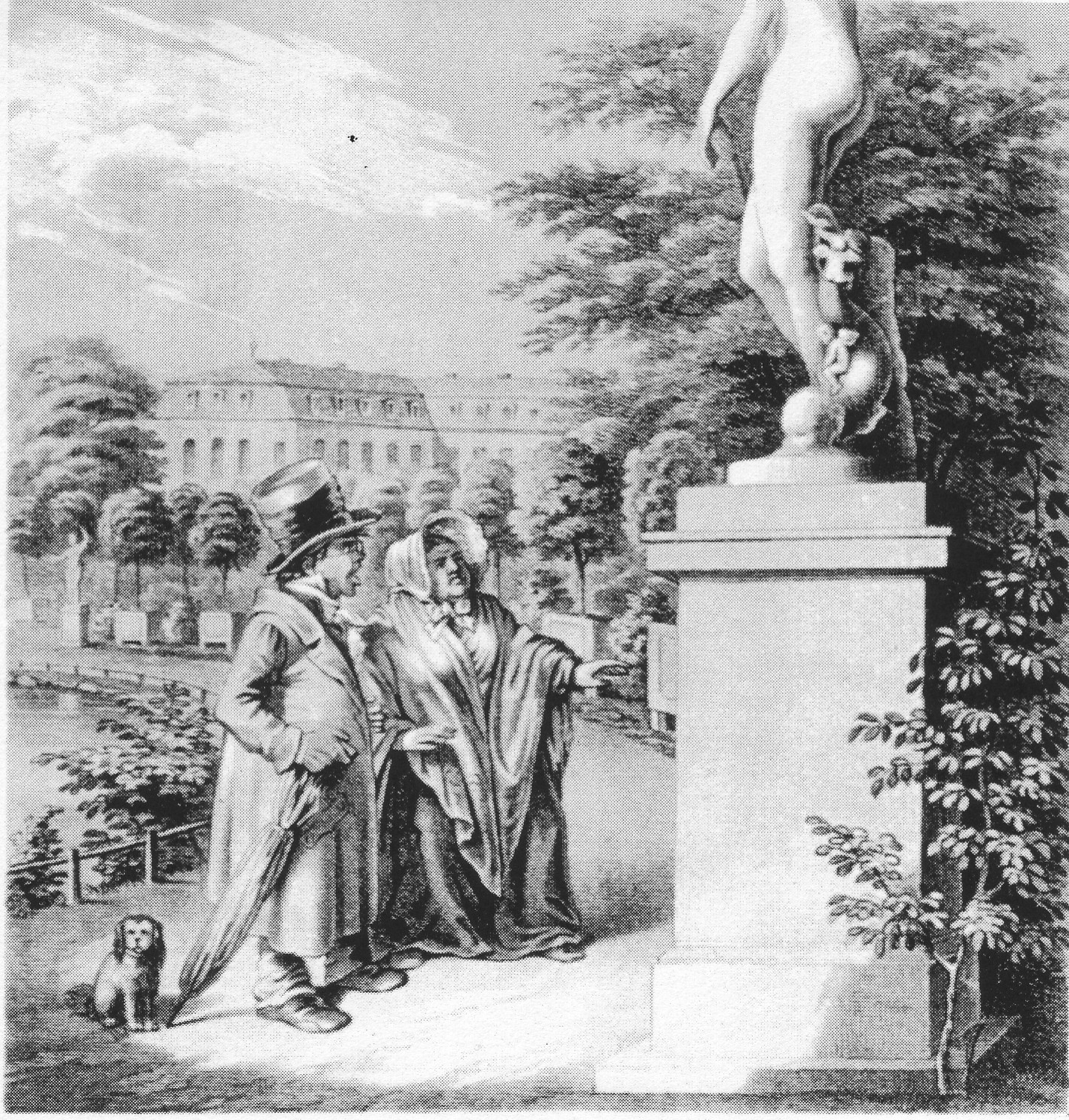 Karikatur "Empörte Bürger" (Lithographie um 1855). 1854 wurden in Stuttgart in den Oberen Anlagen beim Neuen Schloß Kopien antiker Statuen von Ludwig Hofer aufgestellt. Die Nacktheit einiger Figuren verursachte in weiten Kreisen der Bevölkerung sittliche Empörung.